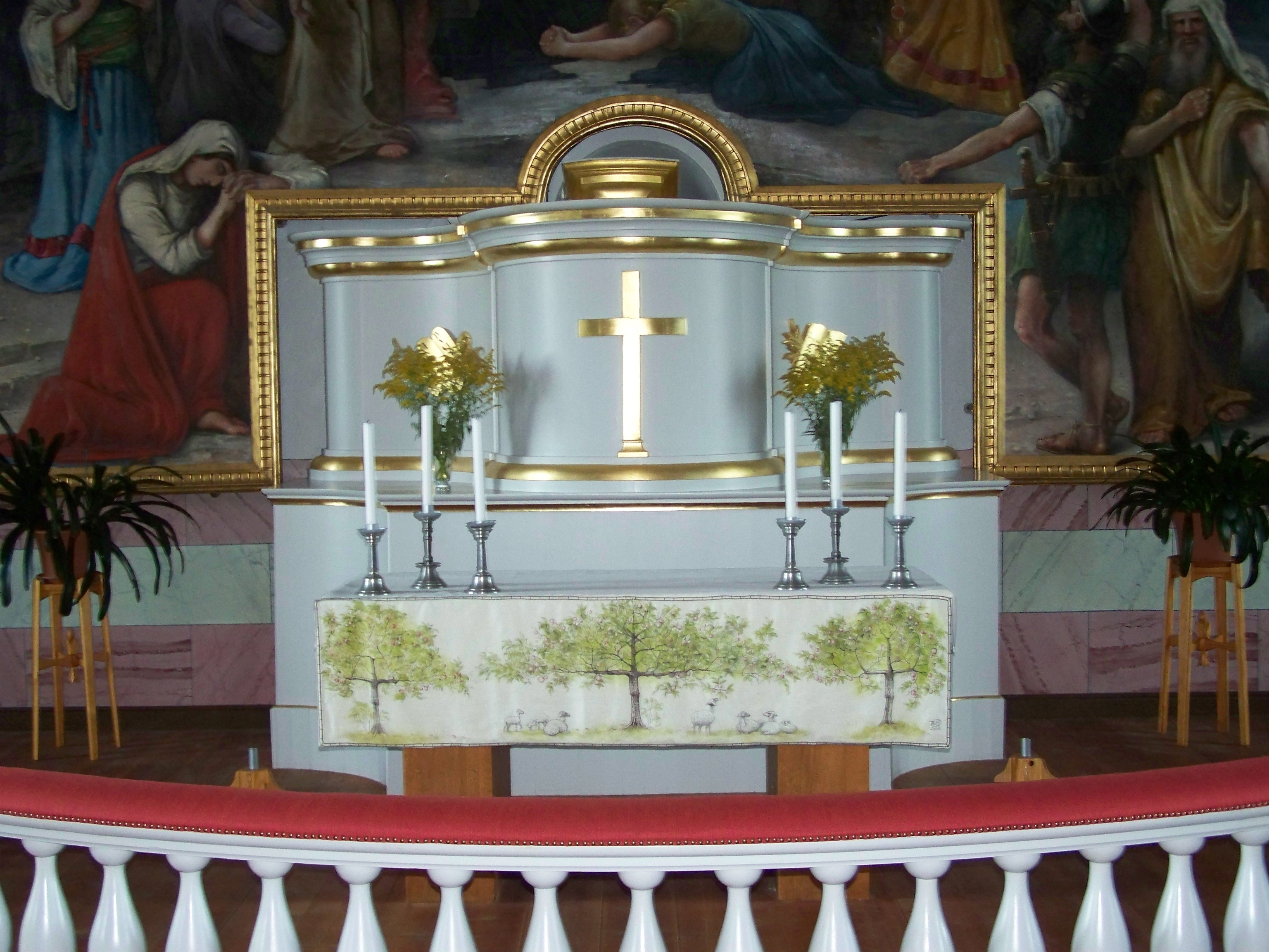 In Schweden. Urshult, Kirche